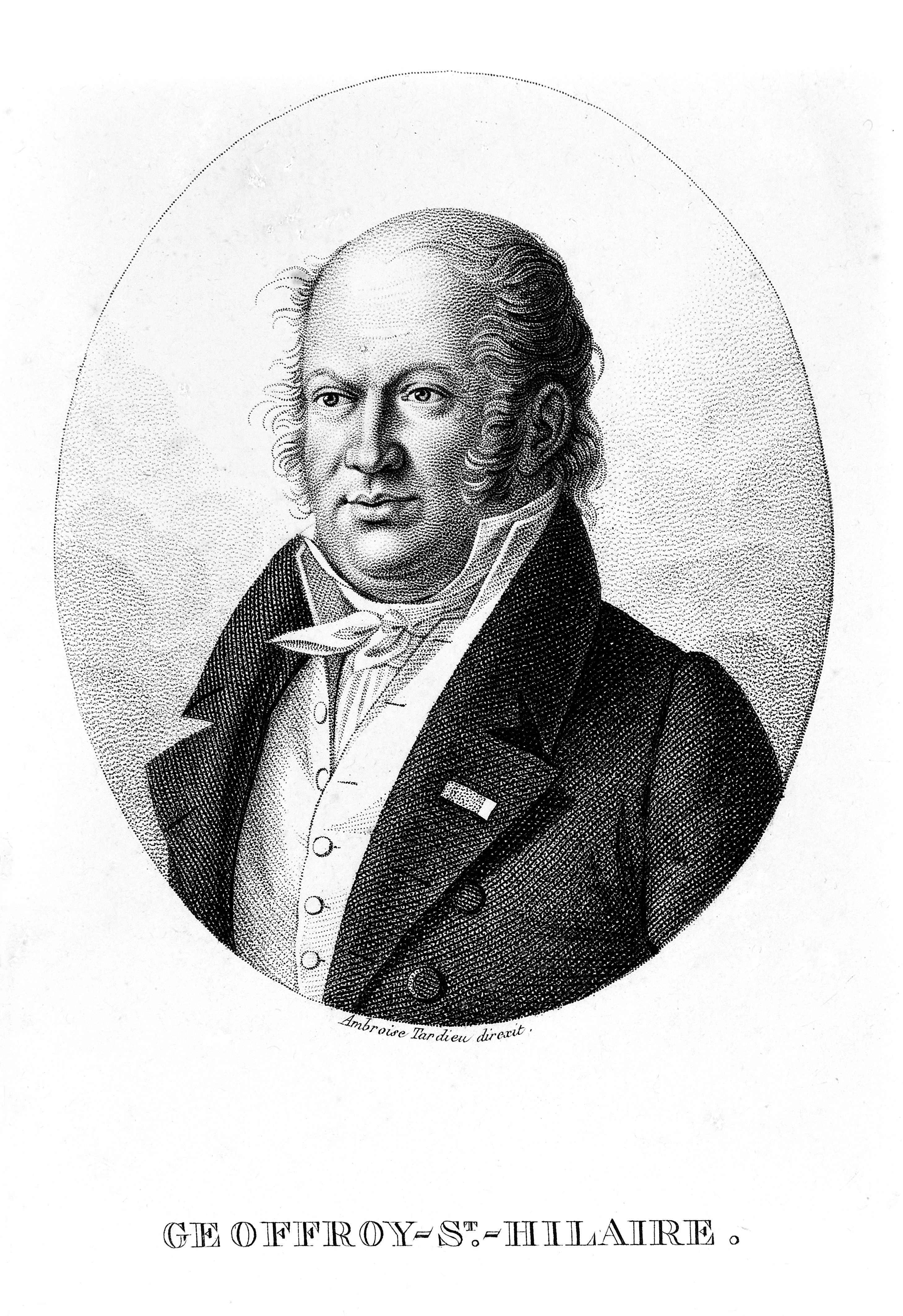 Etienne Geoffroy Saint-Hilaire. Stipple engraving by A. Tardieu. Iconographic Collections Keywords: Ambroise Tardieu; Étienne Geoffroy Saint-Hilaire